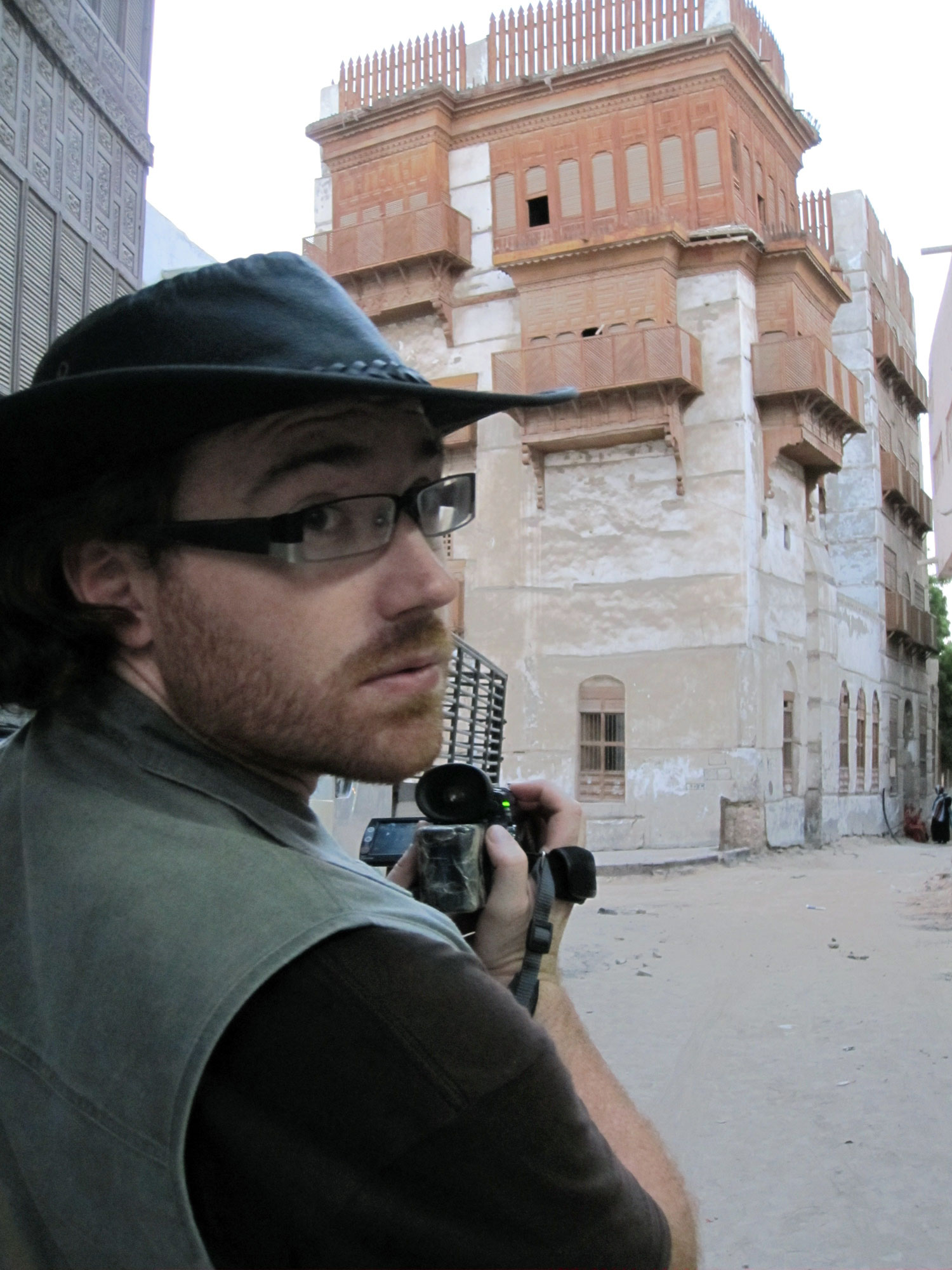 Graham Hughes in Saudi Arabia